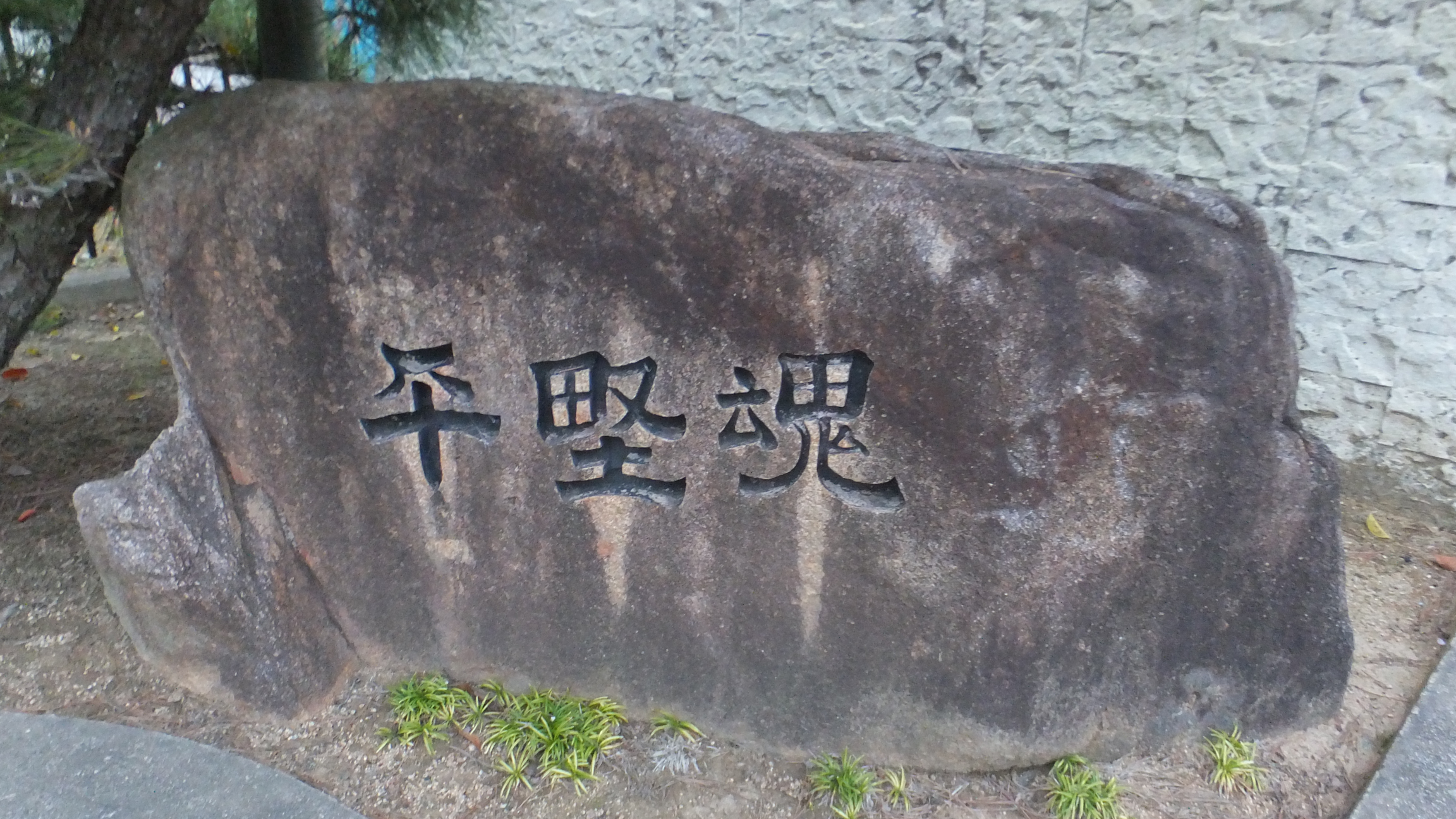 神戸市立平野中学校の「平野魂」と刻まれた岩,兵庫県神戸市